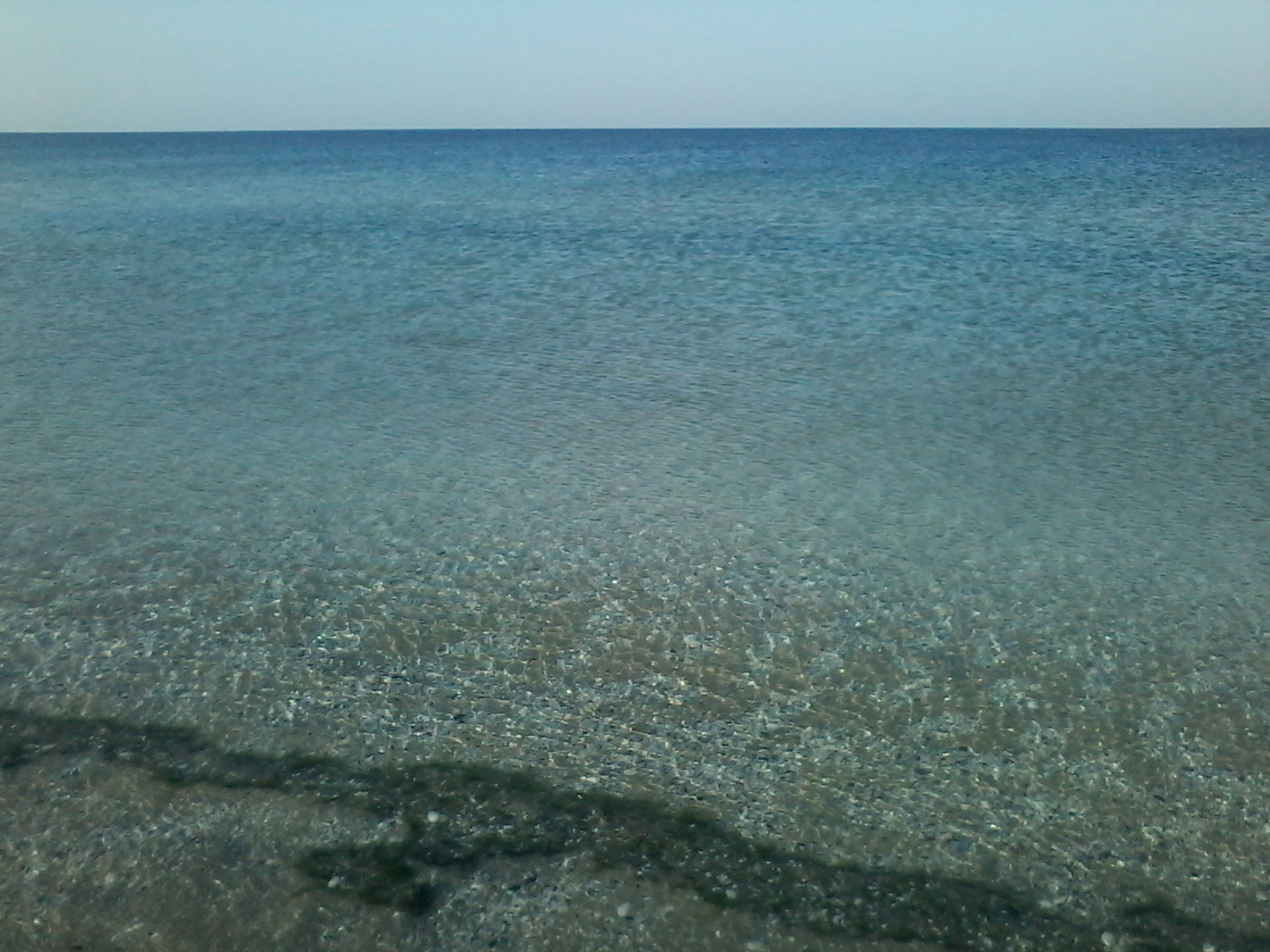 Відпочинок з наметом Кінбурн, літо - дуже чиста але зранку дуже холодна вода